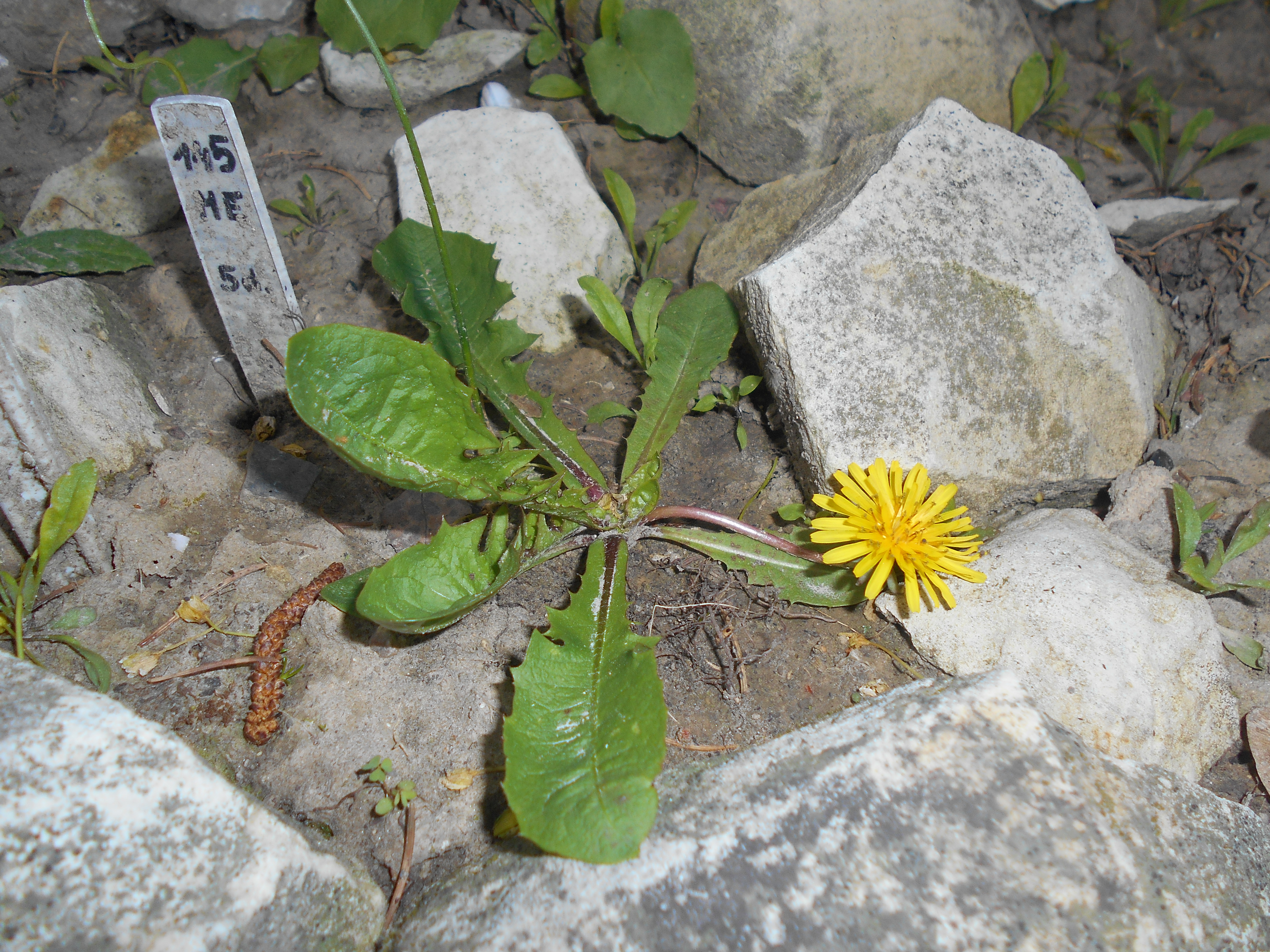 Mniszek pieniński (Taraxacum pieninicum), Ogród Botaniczny UMCS w Lublinie